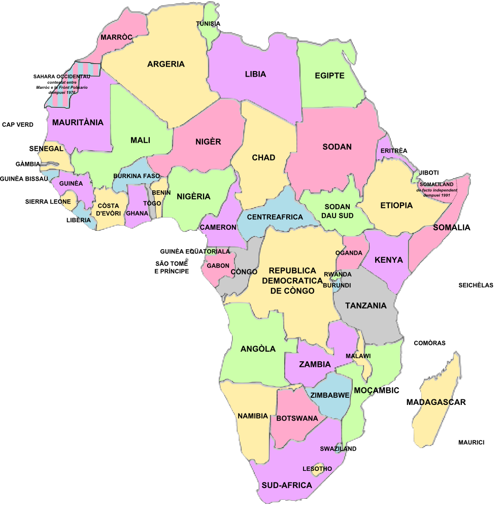 Carta politica d'Africa en 2013.